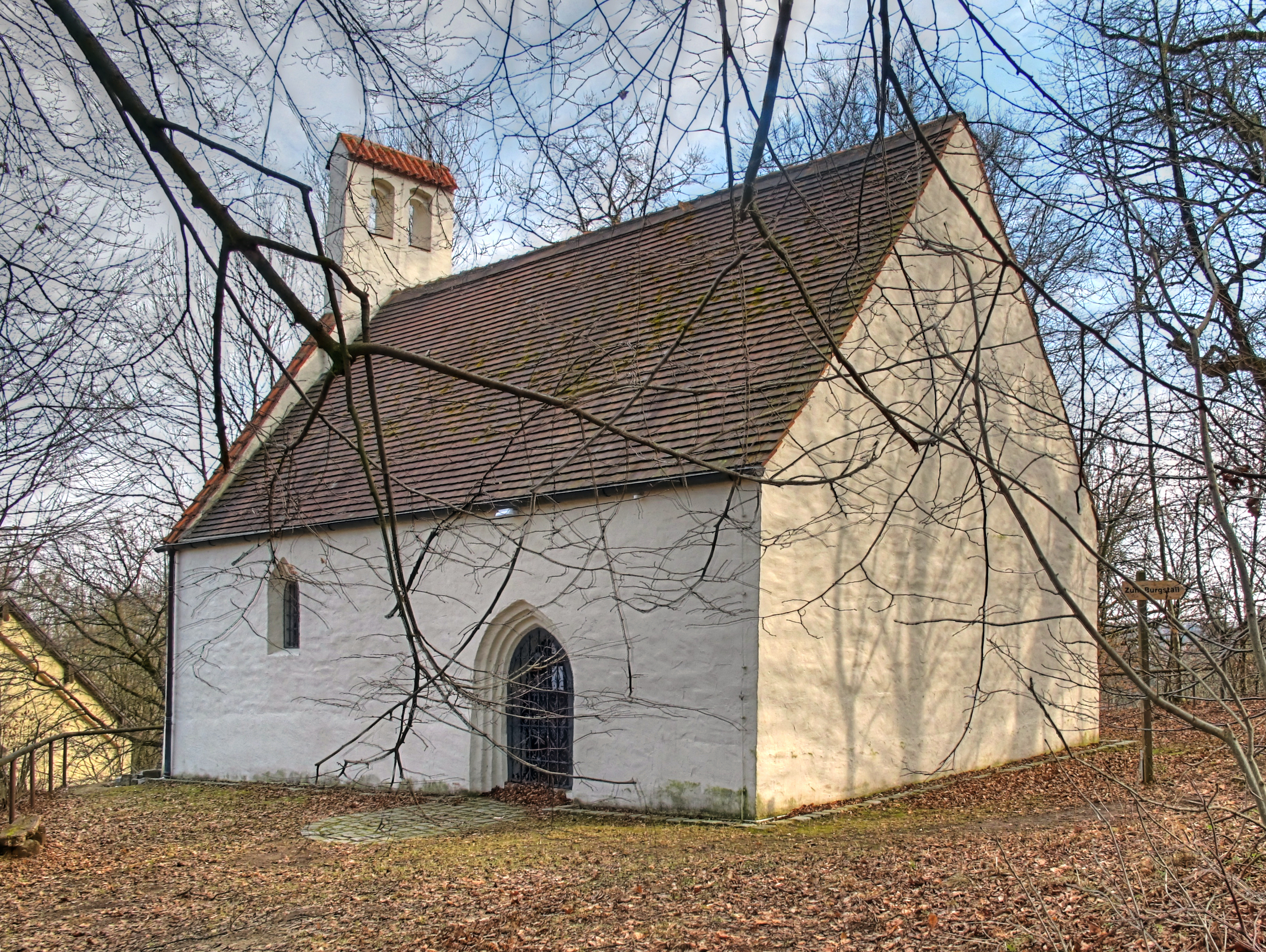 Deutschland, Bayern, Oberbayern, Landkreis Fürstenfeldbruck, Gemeinde Emmering, Ortsteil Roggenstein, St. Georgskapelle